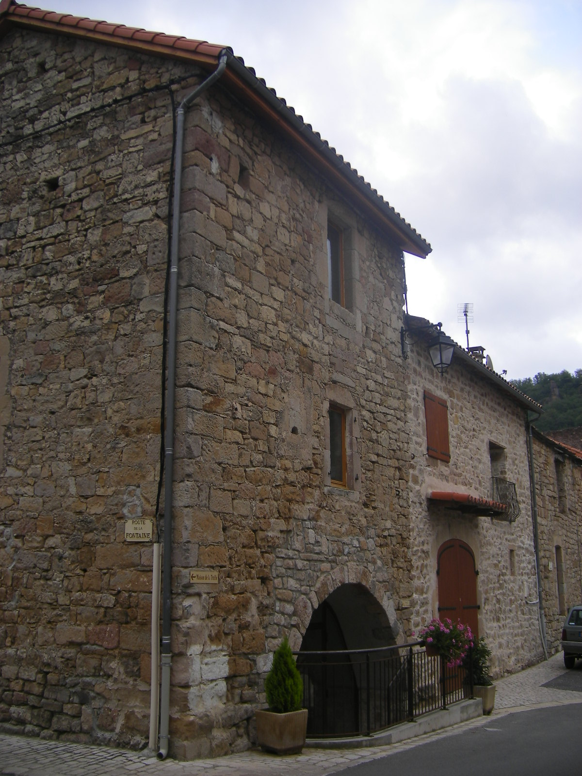 Comprégnac